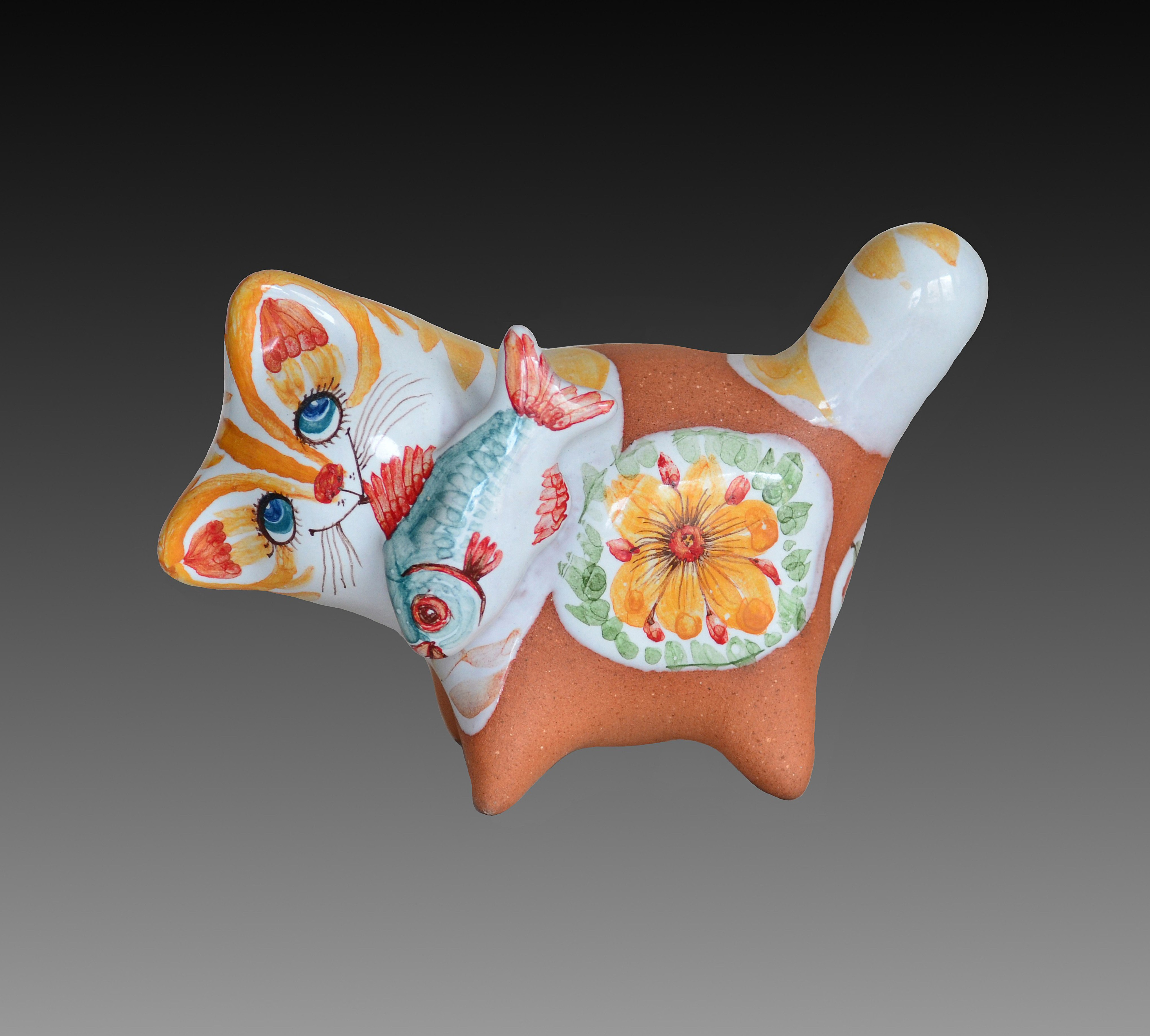 Игрушка "кот-рыболов".Сергиев-Посад.